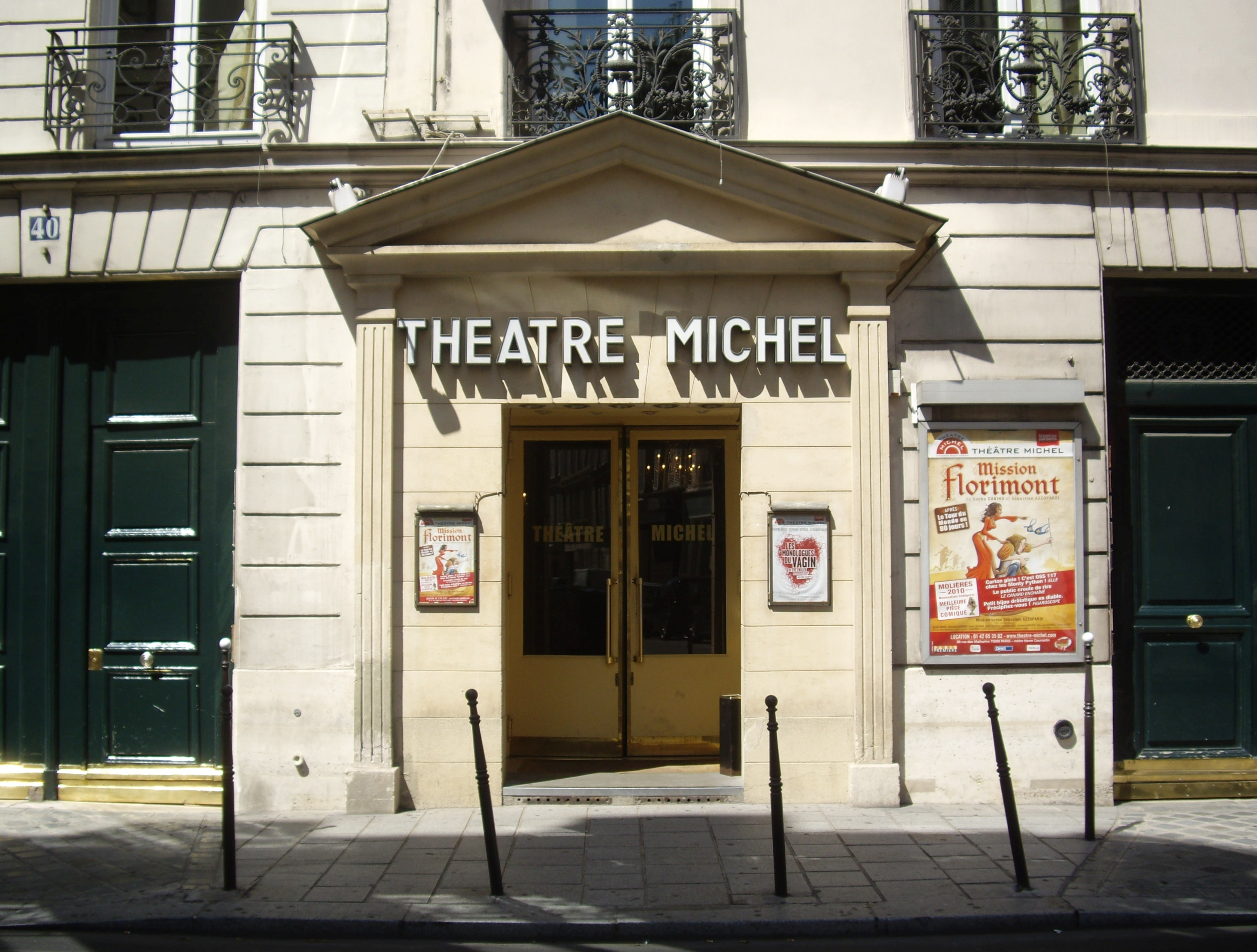 Théâtre Michel, 38 rue des Mathurins, Paris 8e.